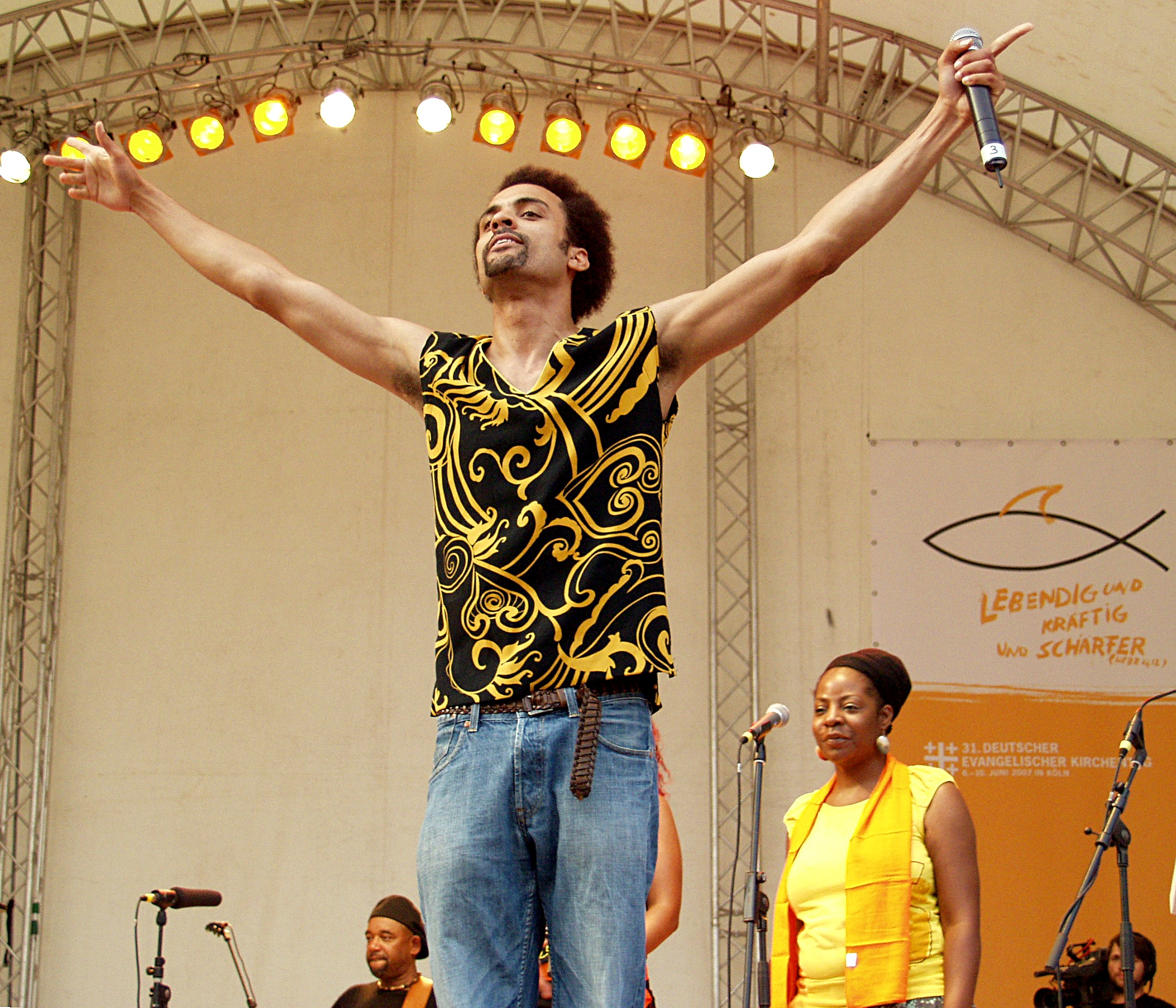 Brothers Keepers auf dem Deutschen Evangelischen Kirchentag 2007 während der Veranstaltung „Die Macht der Würde: Globalisierung neu denken. Ruf an den G8-Gipfel in Heiligendamm“.